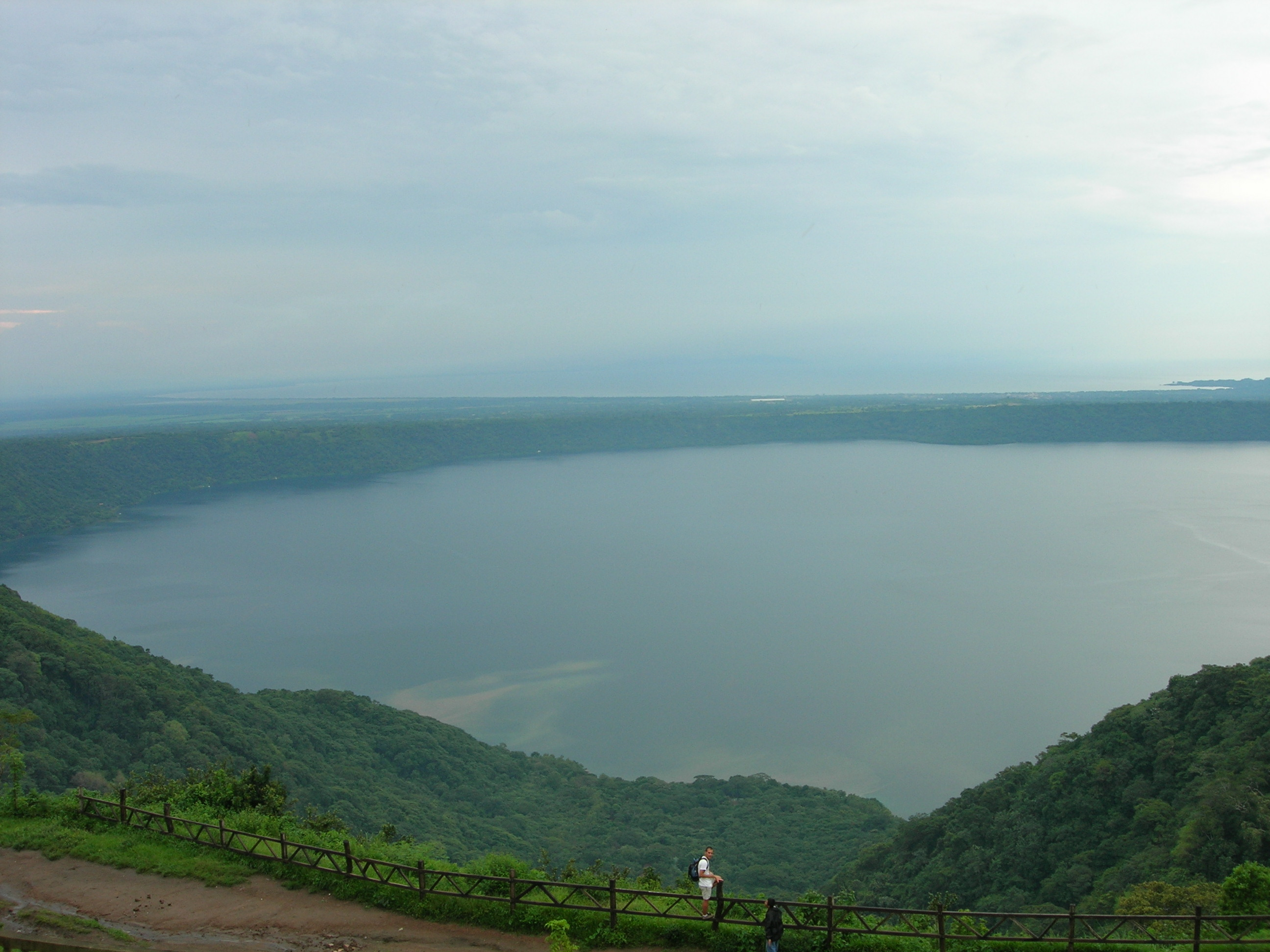 Vista de la laguna de Apoyo desde el mirador de Catarina